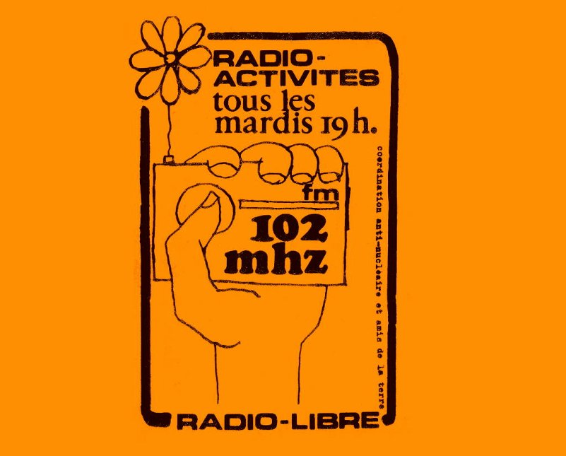 Radio Activités, 1979, Radio libre en Belgique, Association pour la libération des Ondes - Belgique